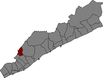 Localització d'Òrrius al Maresme